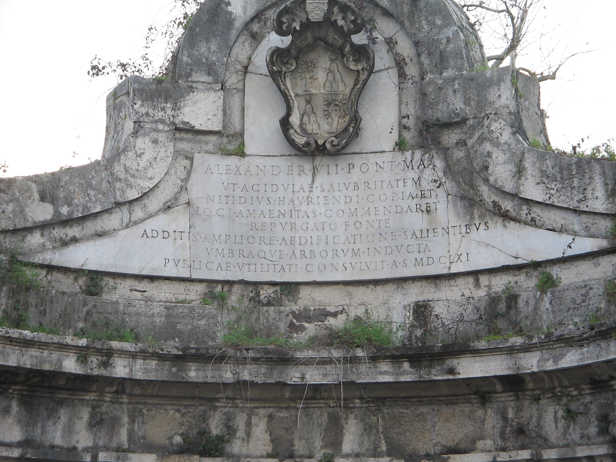 Roma, Fontana dell'Acqua Acetosa (su disegno di Gian Lorenzo Bernini) particolare